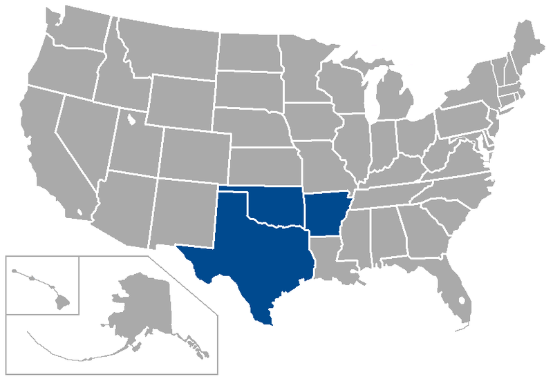 Etats des équipes jouant dans la SWC de 1914 à 1925